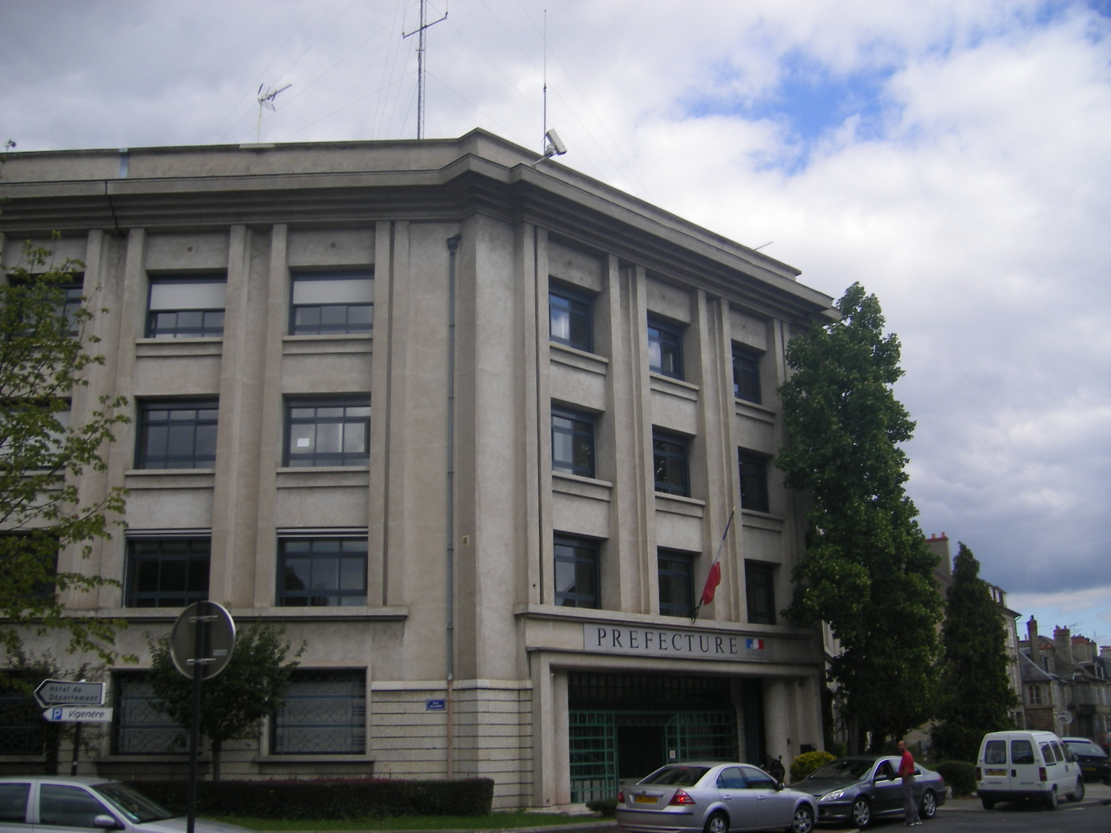 Moulins